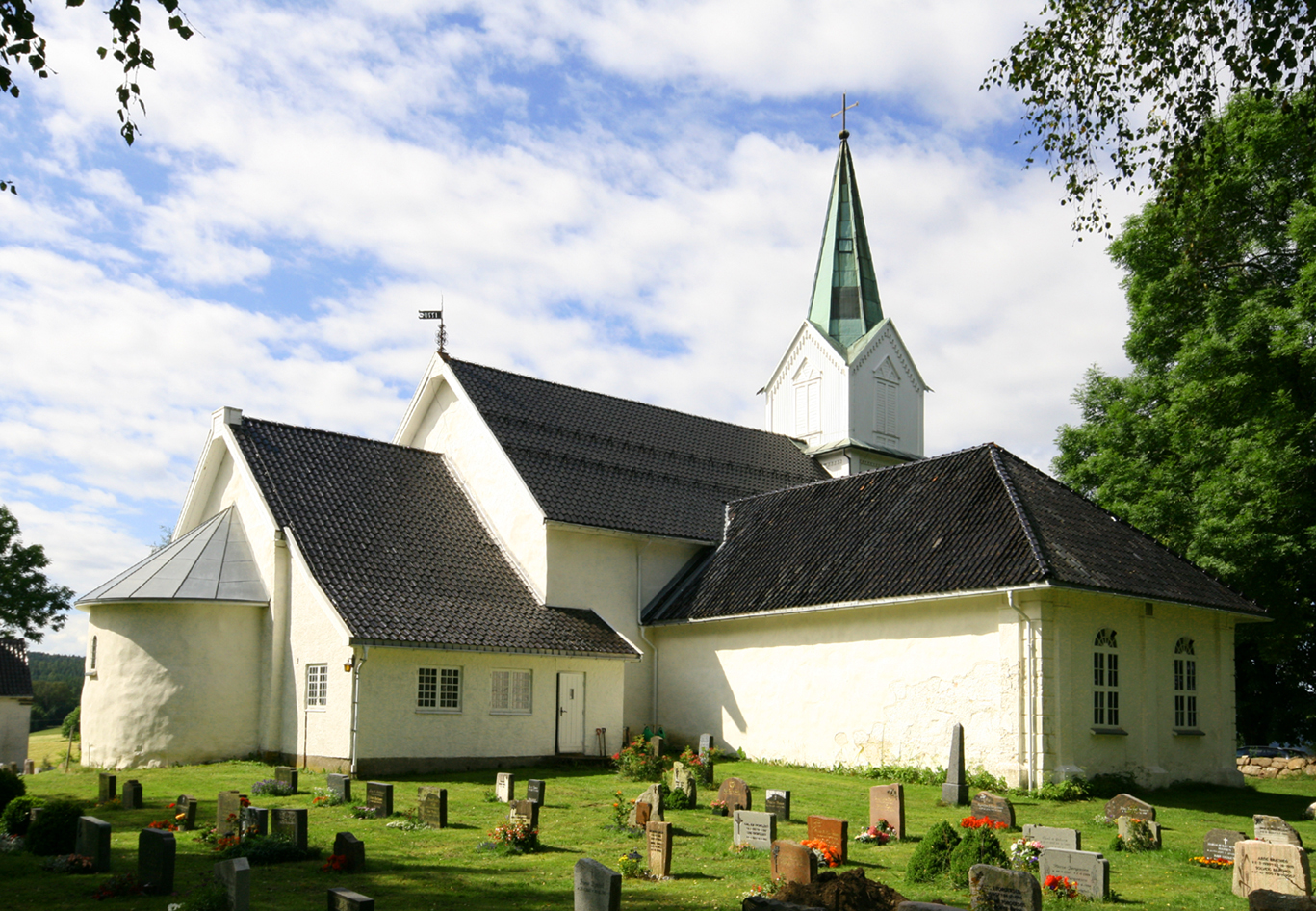 Hurum kirke, med Det huitfeldtske gravkapell nærmest